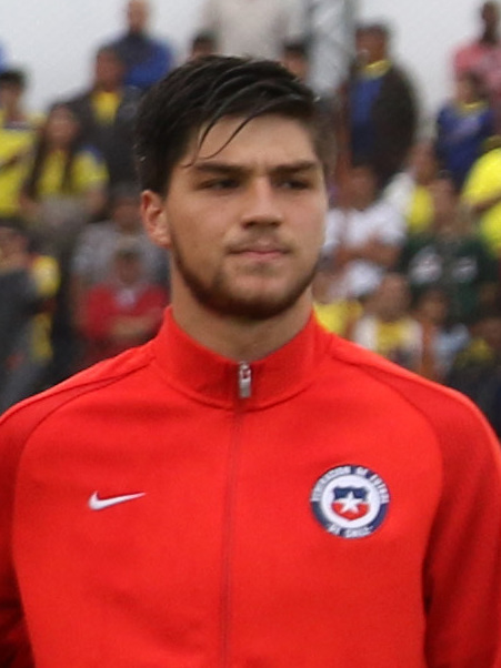 Ambato, Ecuador, 22 enero 2017 (Andes).- Ecuador igualó 1-1 este domingo con Chile en la ciudad de Ambato y dejó vivas las posibilidades de clasificar a la fase final del Campeonato Sudamericano Sub 20 del que es anfitrión, y se alista desde ya para jugar con Paraguay en la última jornada, el jueves próximo, en la ciudad ecuatoriana de Ríobamba. ANDES/Micaela Ayala V.